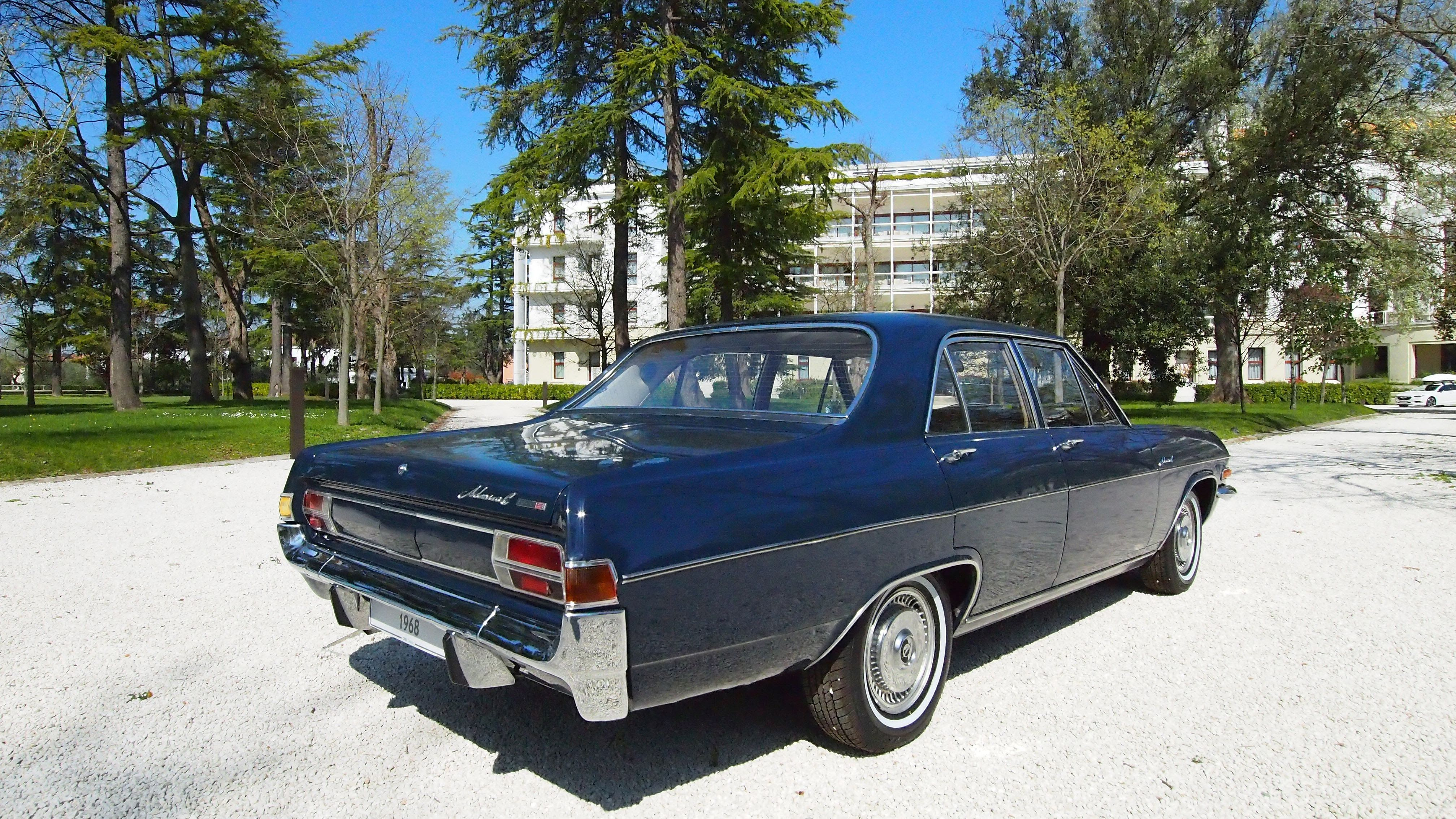 Opel Admiral, märts 2017, Veneetsia